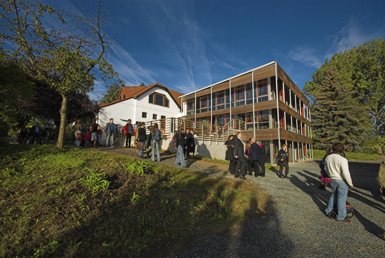 Campus I Johannishof